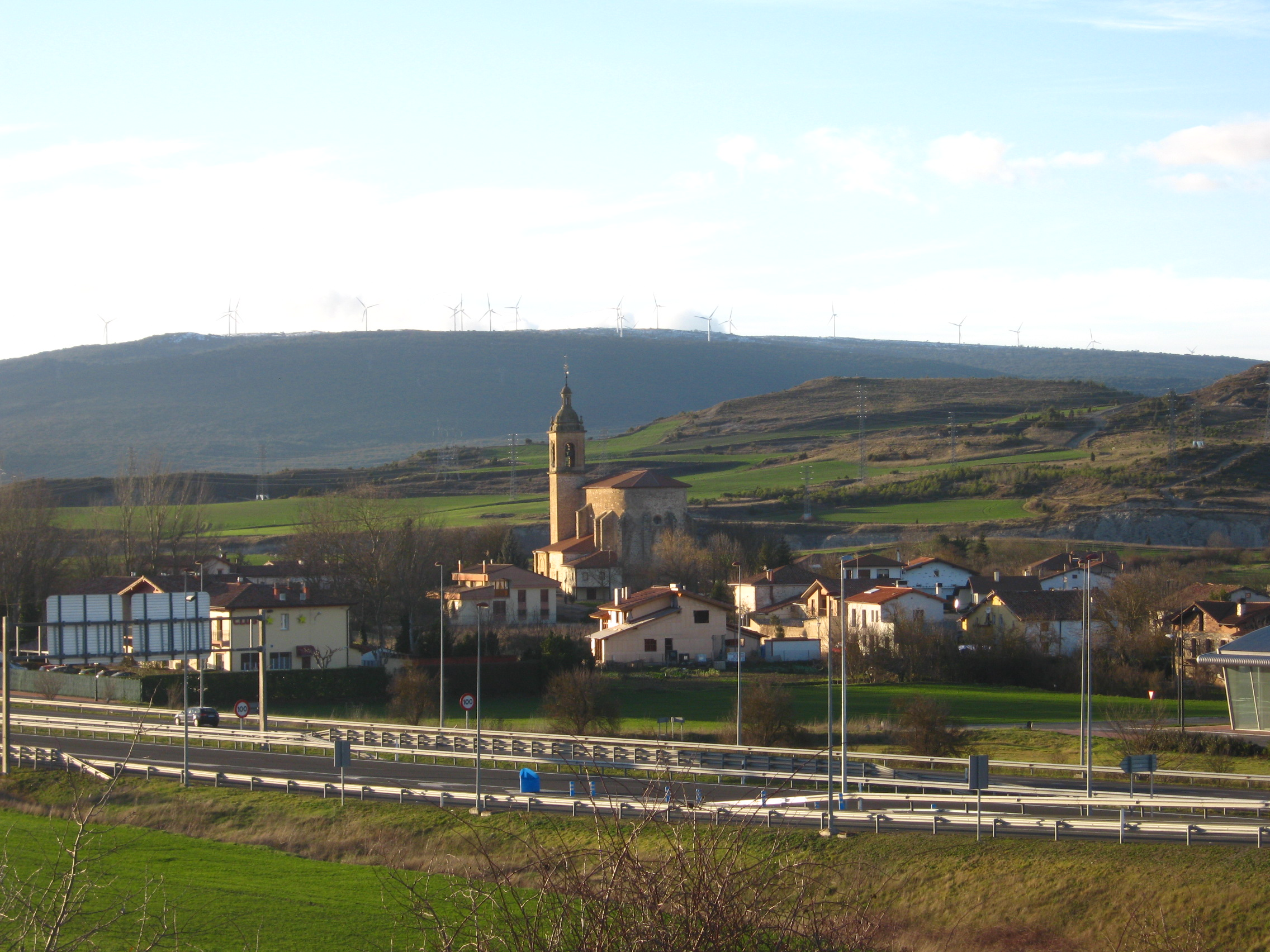 Panorámica de Aríñez (Álava, España)